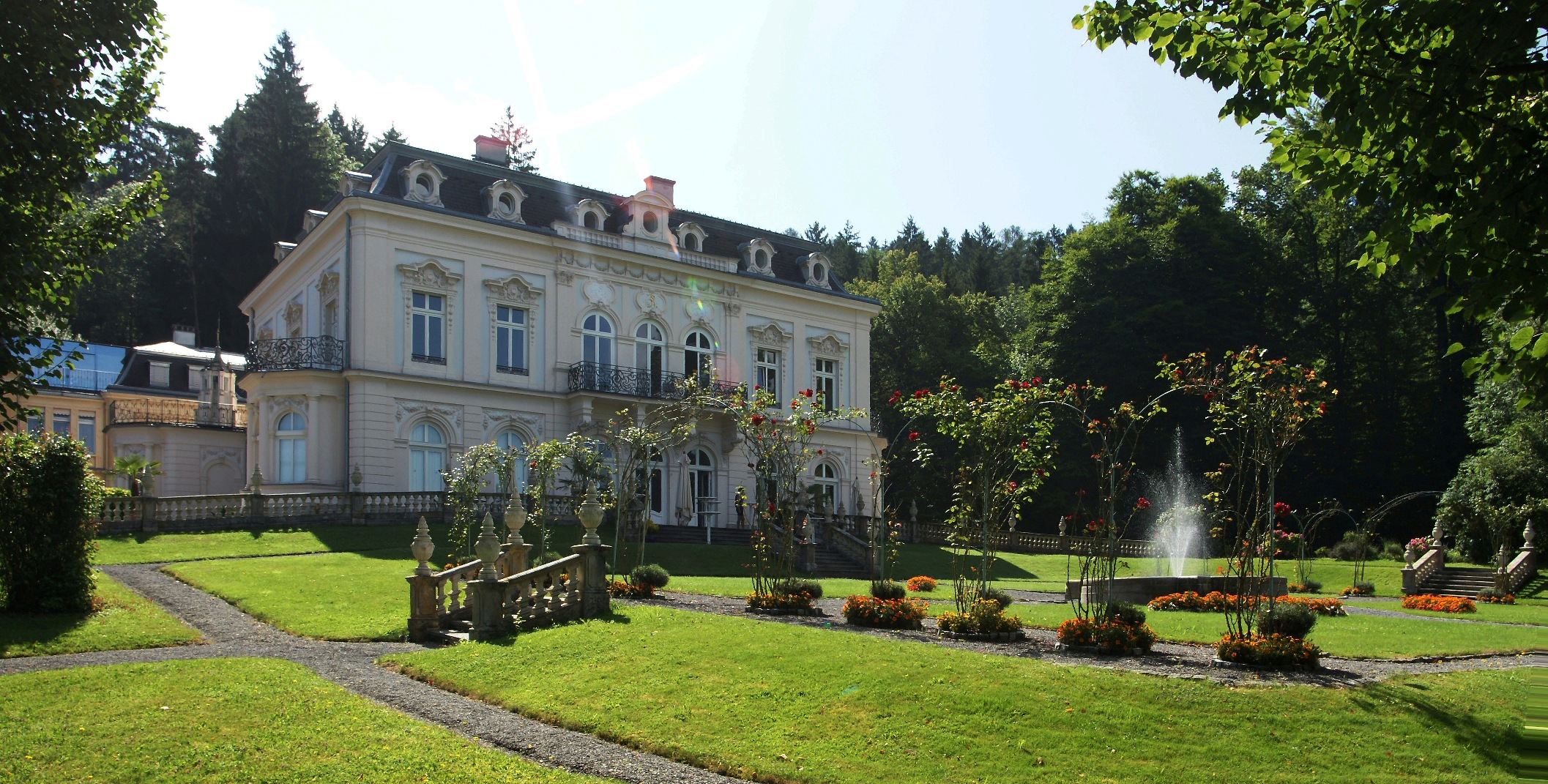 Kloster Marienberg, Villa Raczyński. 1877 ließ der polnische Graf Raczyński diese Villa am Nordwest-Abgang des Gebhardsbergs in Bregenz für seine Frau erbauen. Die Schloßvilla im neubarocken Stil (von Stefan Dragl) krönt die leicht ansteigende Parklandschaft. Seit 1904 beherbergt die Villa ein Kloster der Dominikanerinnen und eine Schule.